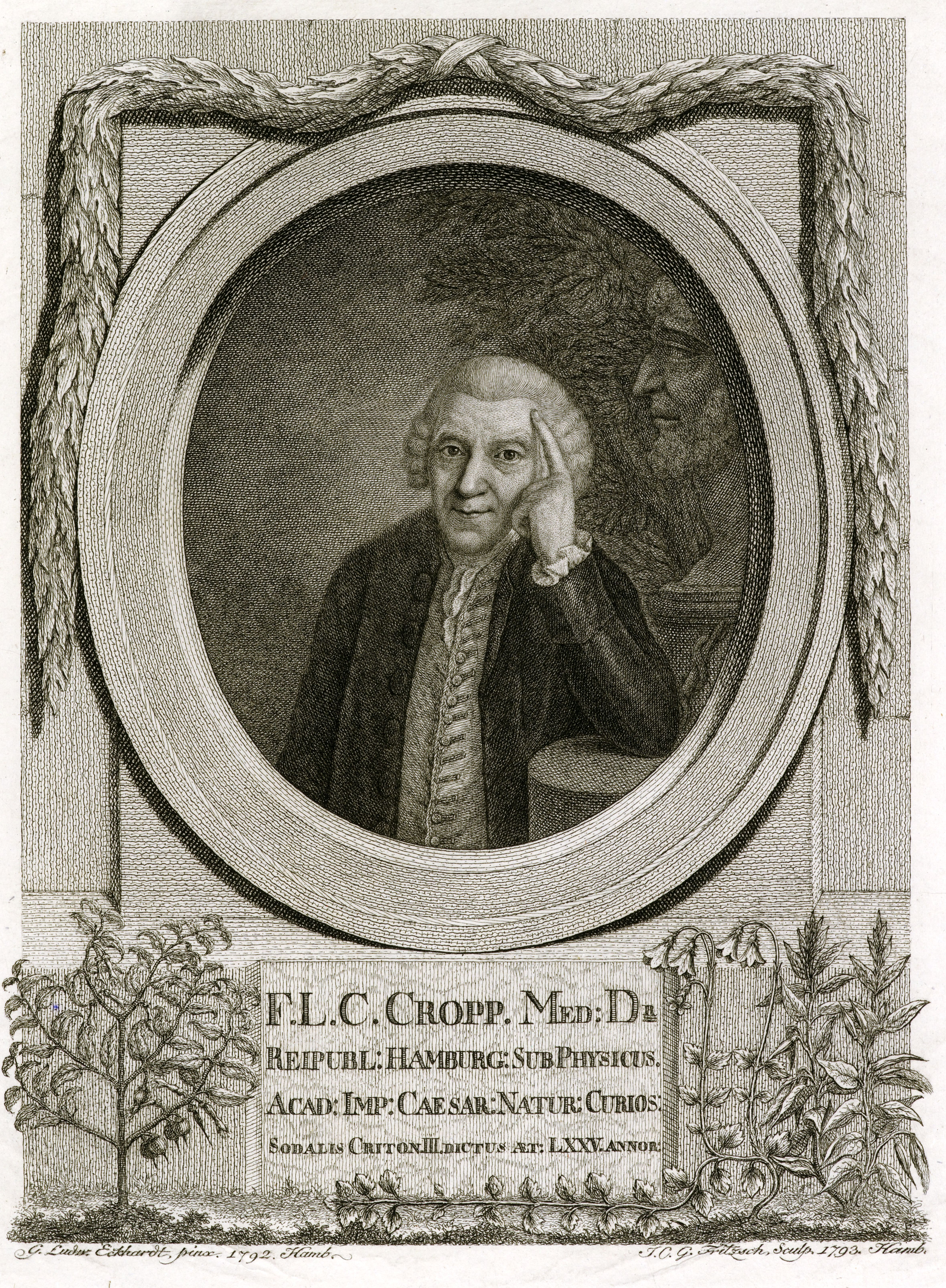 Bildnis von Friedrich Ludwig Christian Cropp